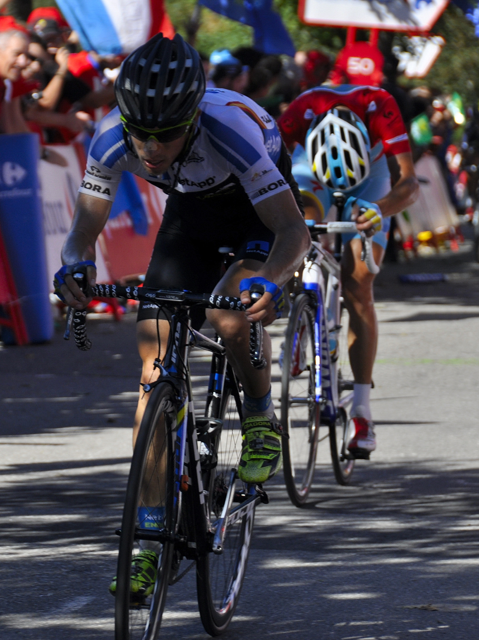 Leopold König (Netupp) y Vincenzo Nibali (Astana) llegando en 8º y 9º puesto a la cima del Naranco.